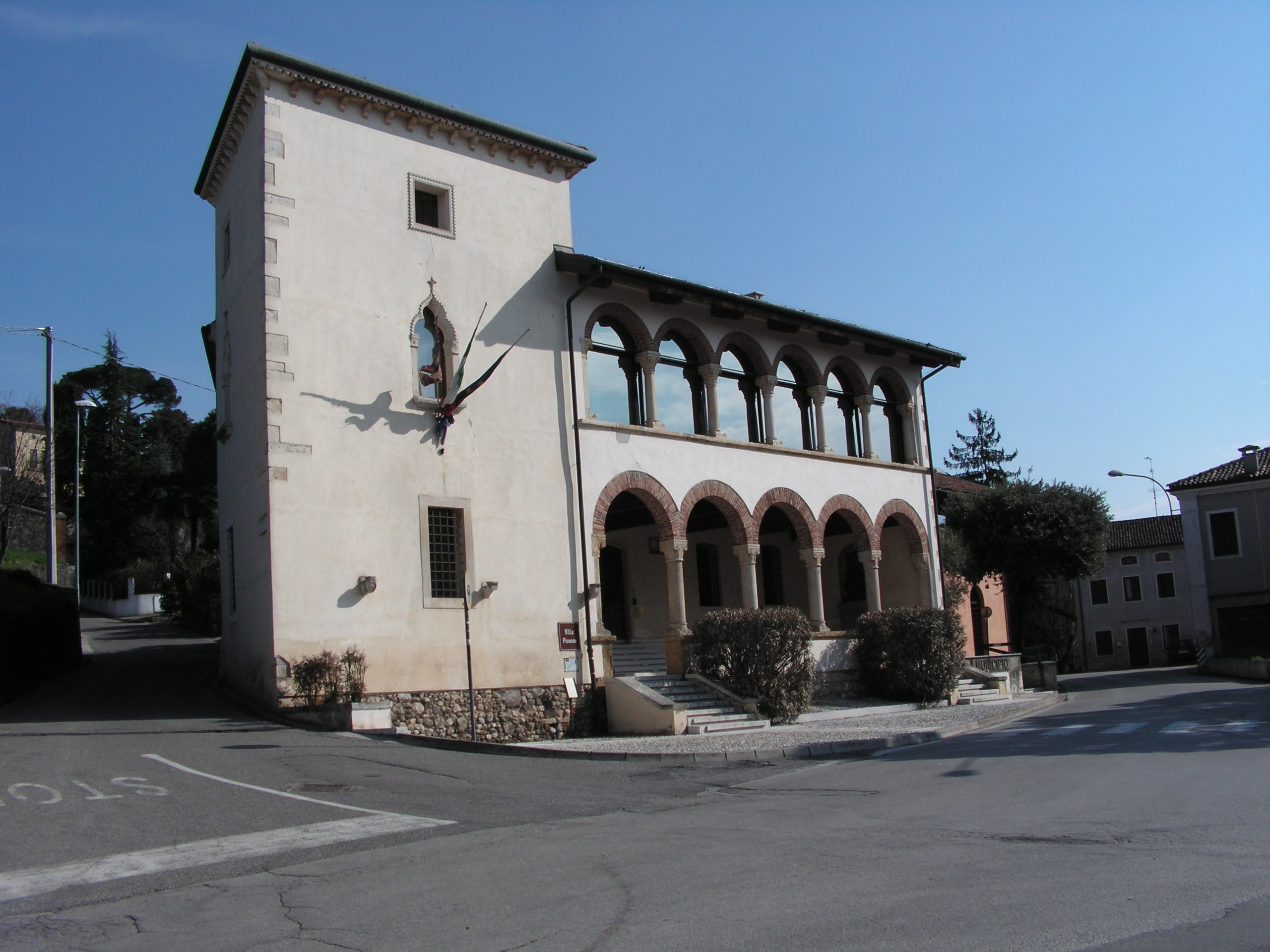 Villa Piovene a Brendola, Vicenza, Italia